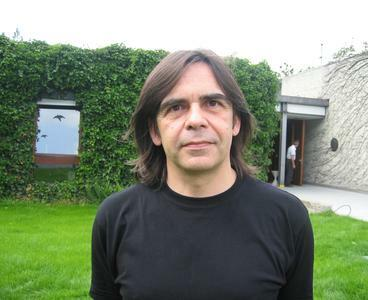 Foto di Endre Süli